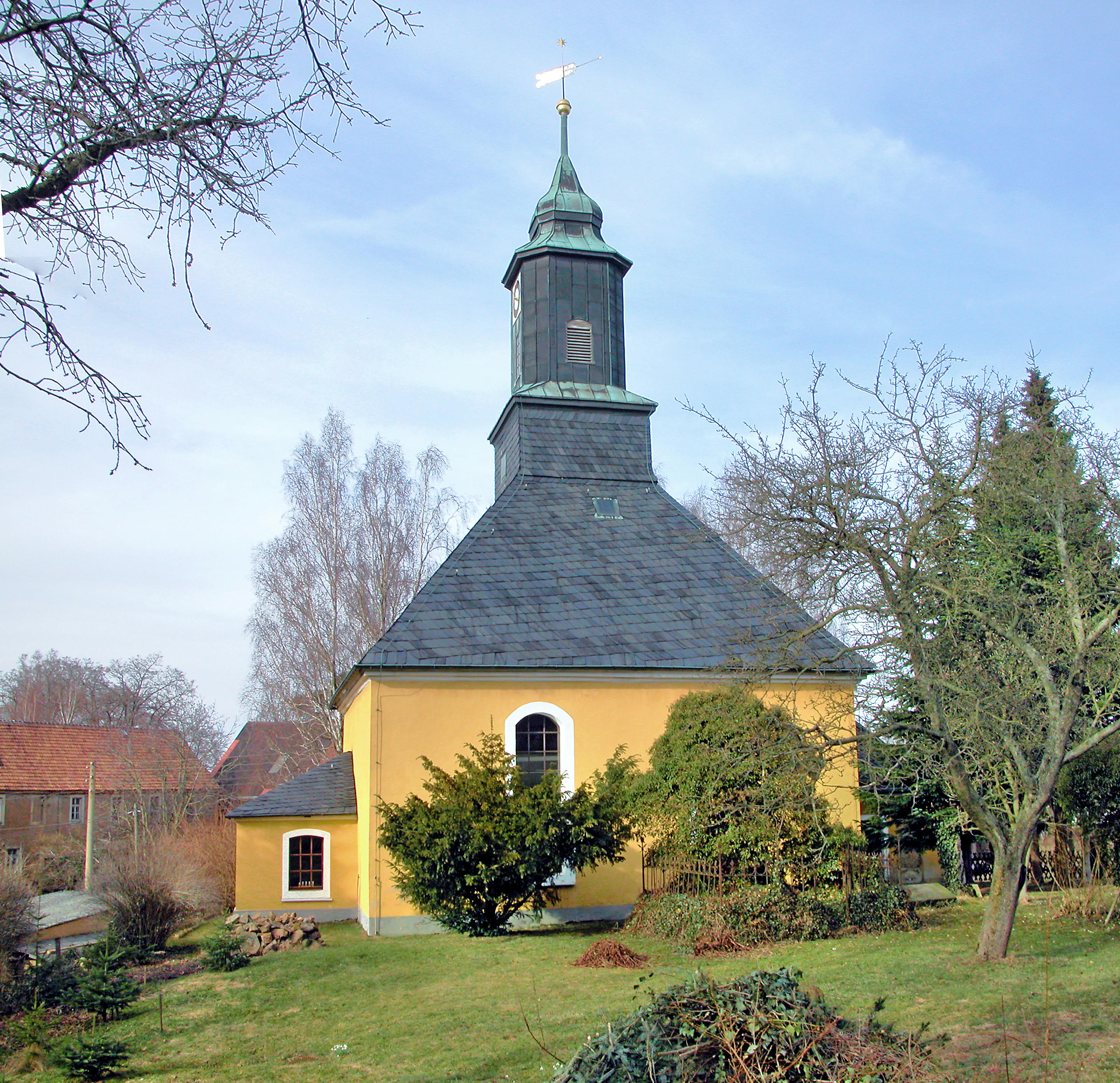 24.03.2010 04720 Ziegra (Ziegra-Knobelsdorf, ab 2013 zu Döbeln): Zum Park. Blick von Süden zur Kirche (GMP: 51.105617,13.055743). Sie wurde 1769/70 durch den Rittergutsbesitzer Julius Moritz von Hartitzsch errichtet. Die Umfassungsmauern sind teilweise noch vom Vorgängerbau, den man 1769 abbrach. [DSCN40577+40581.TIF]20100324405MDR.JPG(c)Blobelt